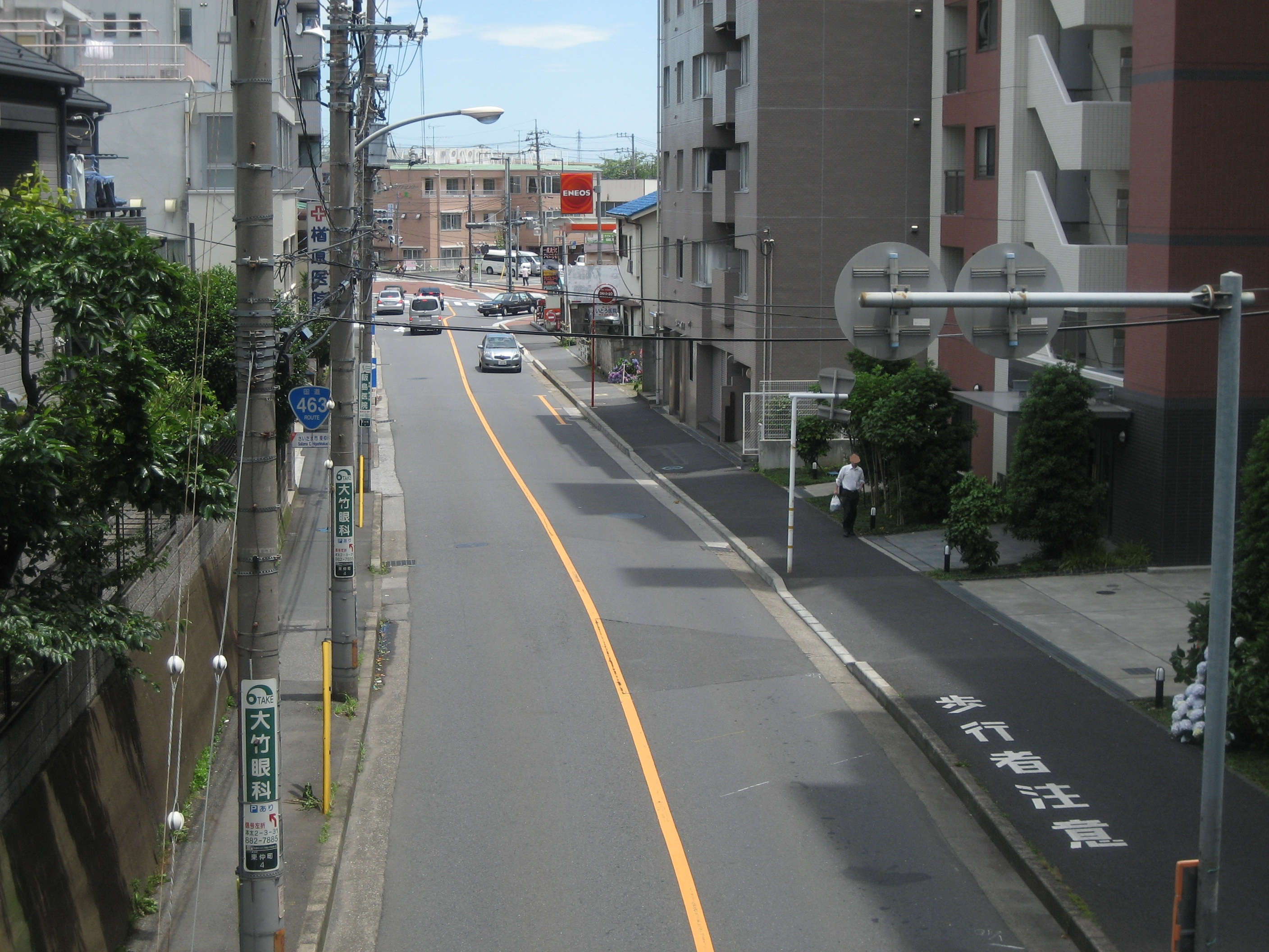 国道４６３号線浦和区本太付近